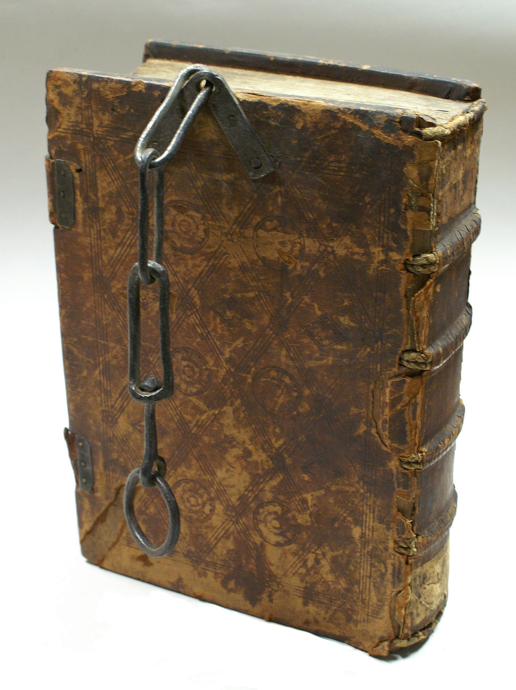 Kettenbuch, ex-bibliotheka gymnasii altonani